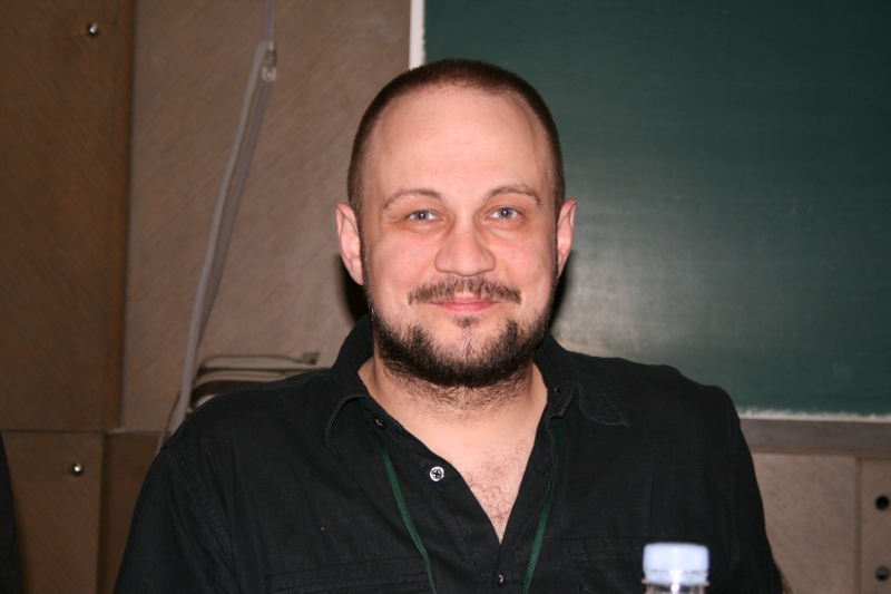 Oto Oltvanji na SFeraKonu u Zagrebu